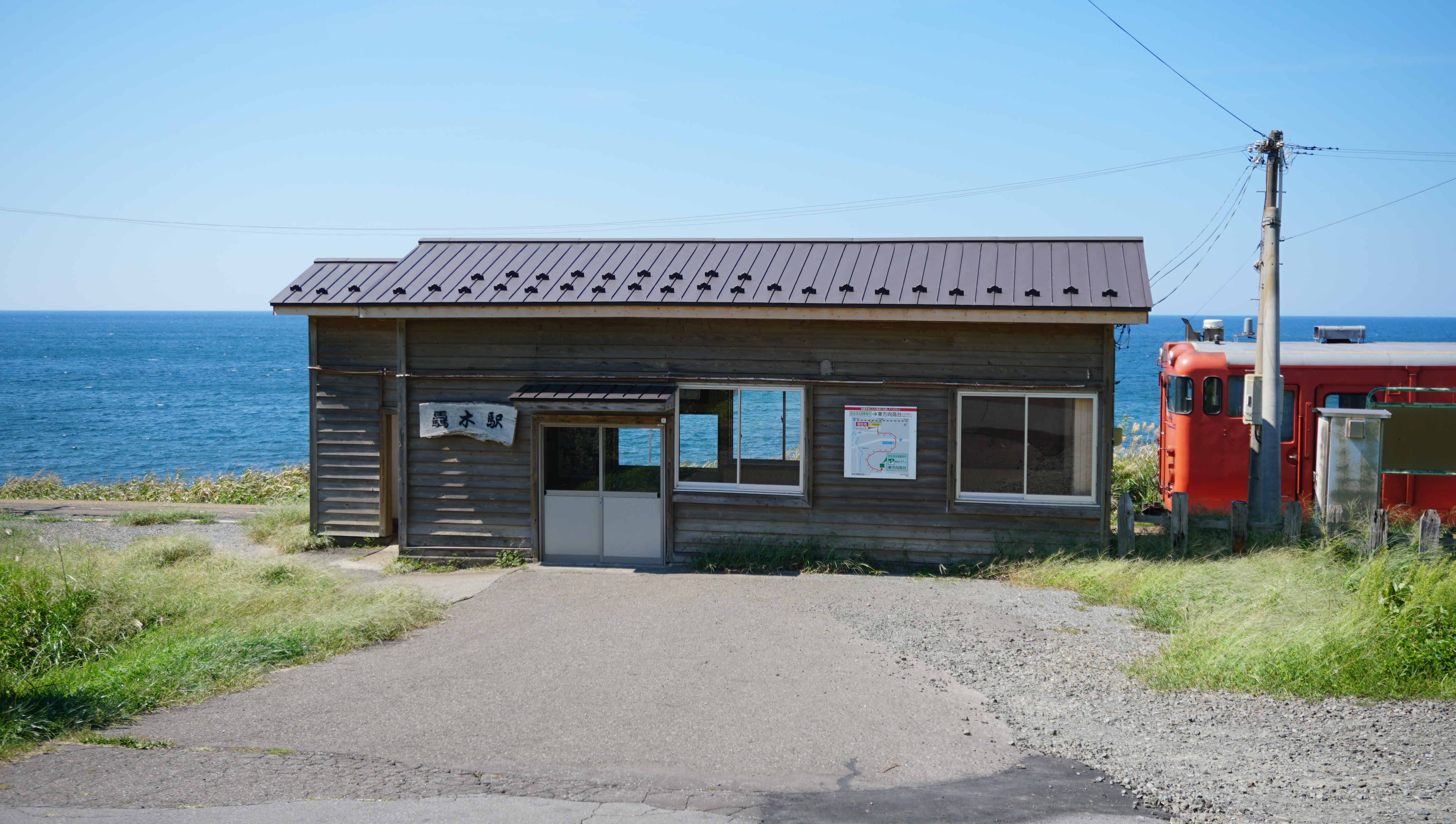 五能線 驫木駅と、停車するキハ40系首都圏色編成